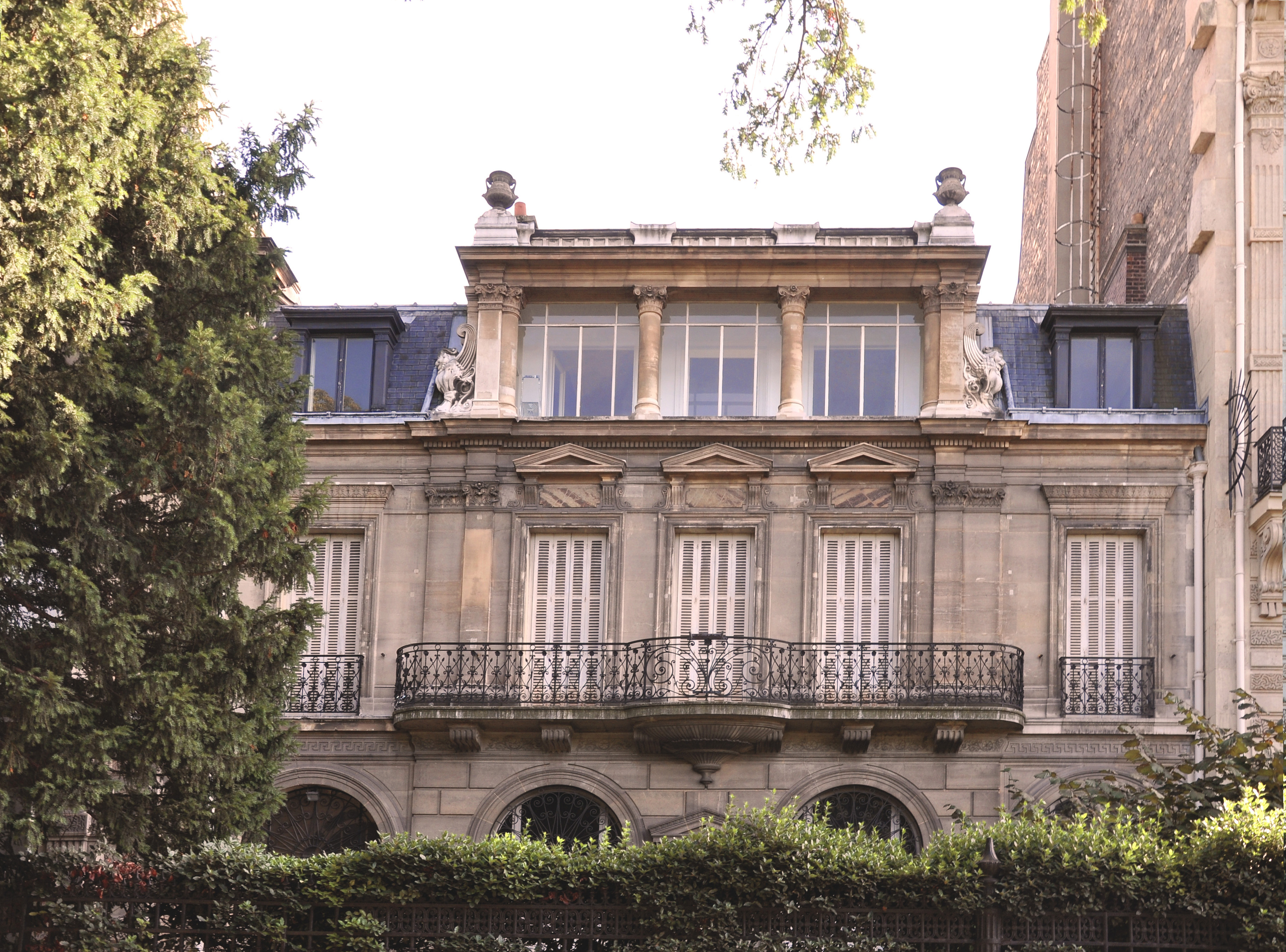 Ennery museum located at 59 Avenue Foch in the 16th arrondissement of Paris in France is a museum of Asian art, registered by the French Ministry of Culture as historical monuments.